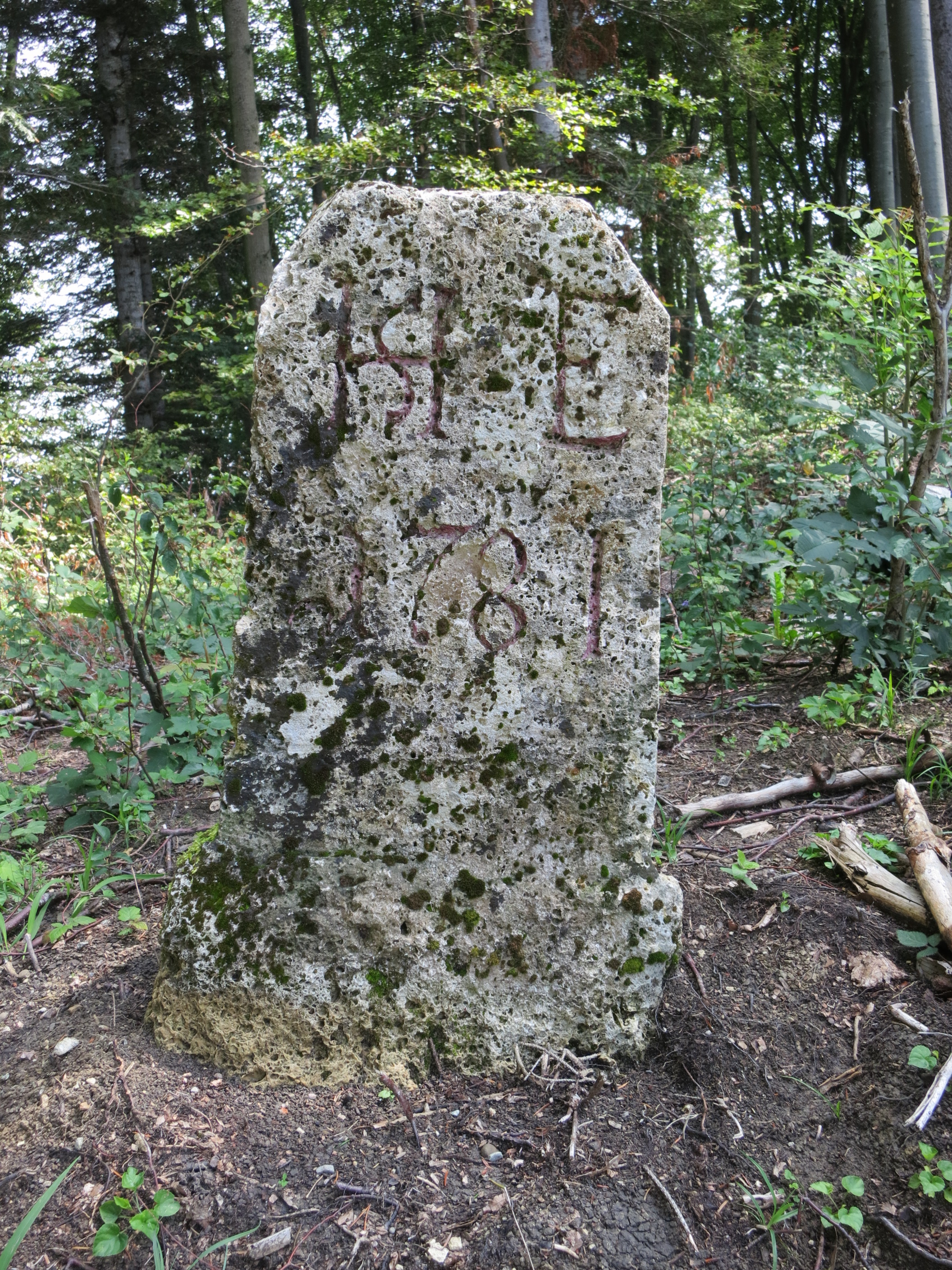 Grenzstein von 1781, Elgg ZH, Schweiz